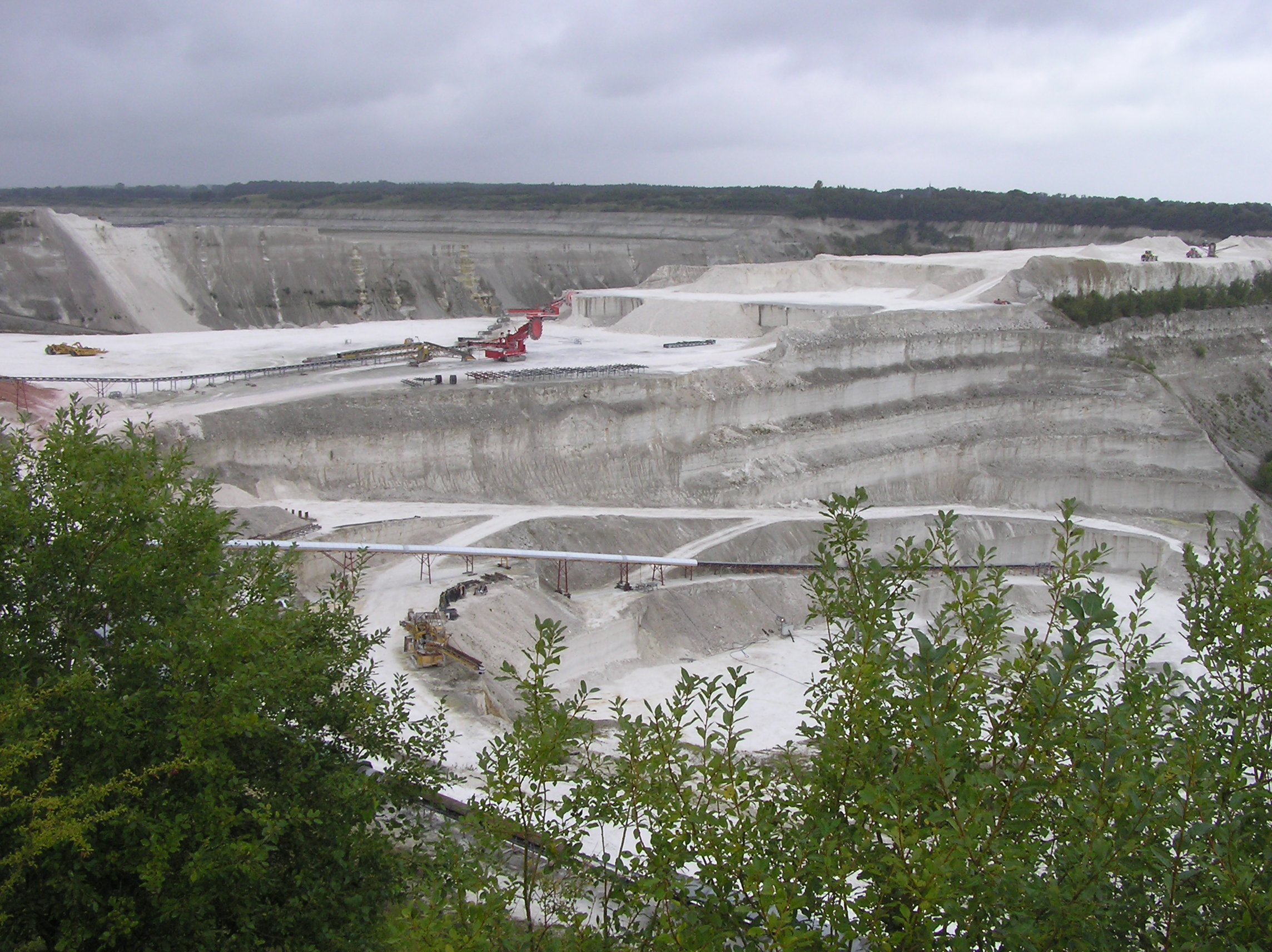 Kalkabbau Lägerdorf